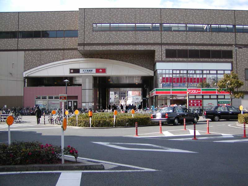 南海電鉄・大阪市営地下鉄 天下茶屋駅 2007年1月 投稿者が撮影